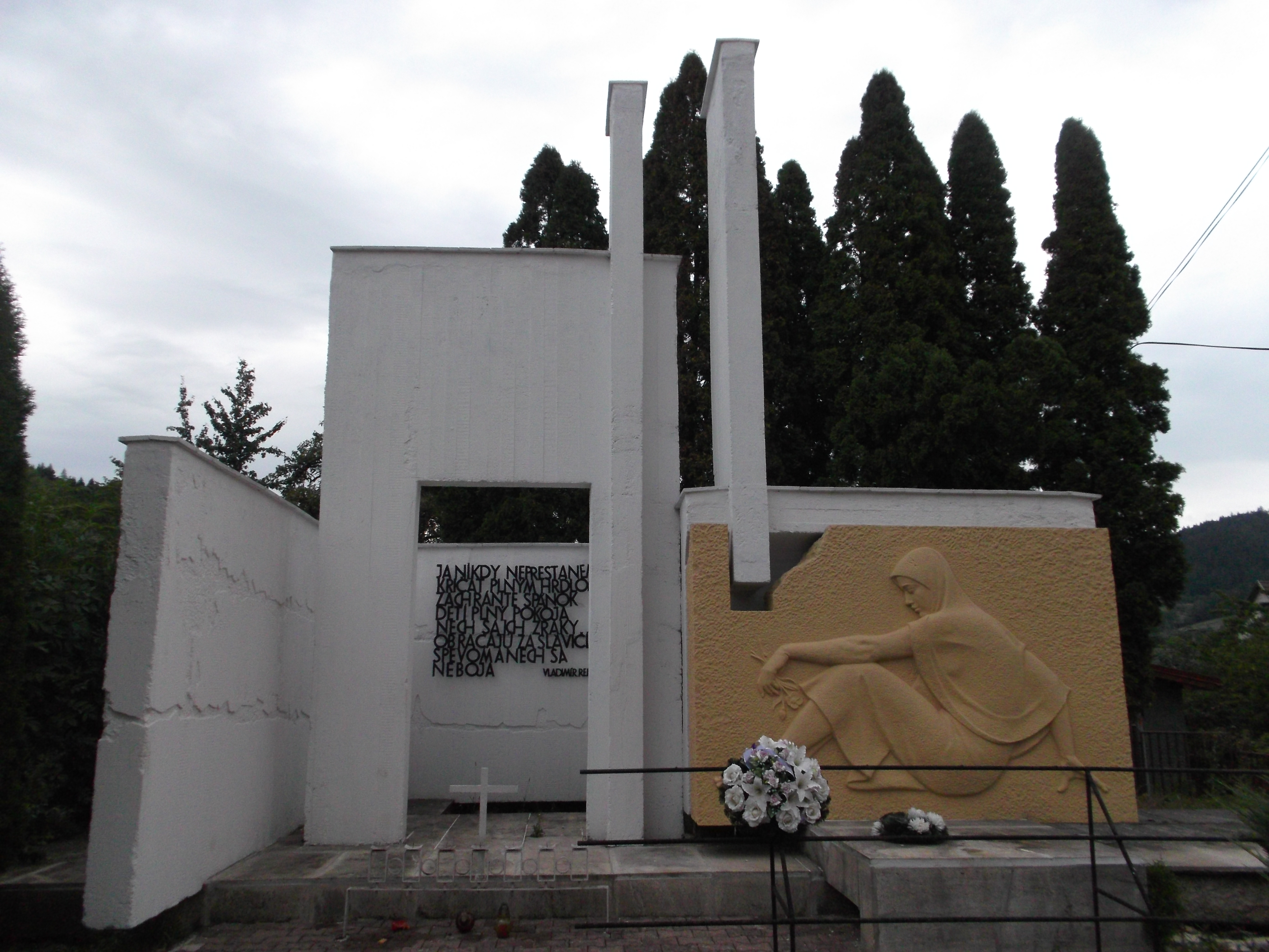 Pamätník